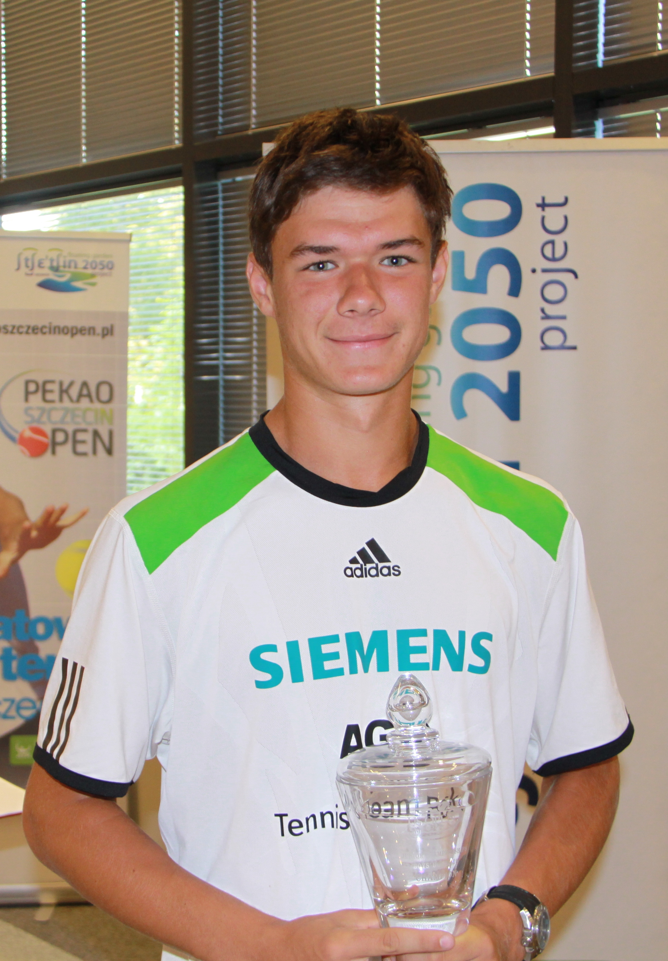 Kamil Majchrzak z pucharem za zwycięstwo w deblowym US Open juniorów